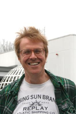 Foto di Andrew M. Stuart